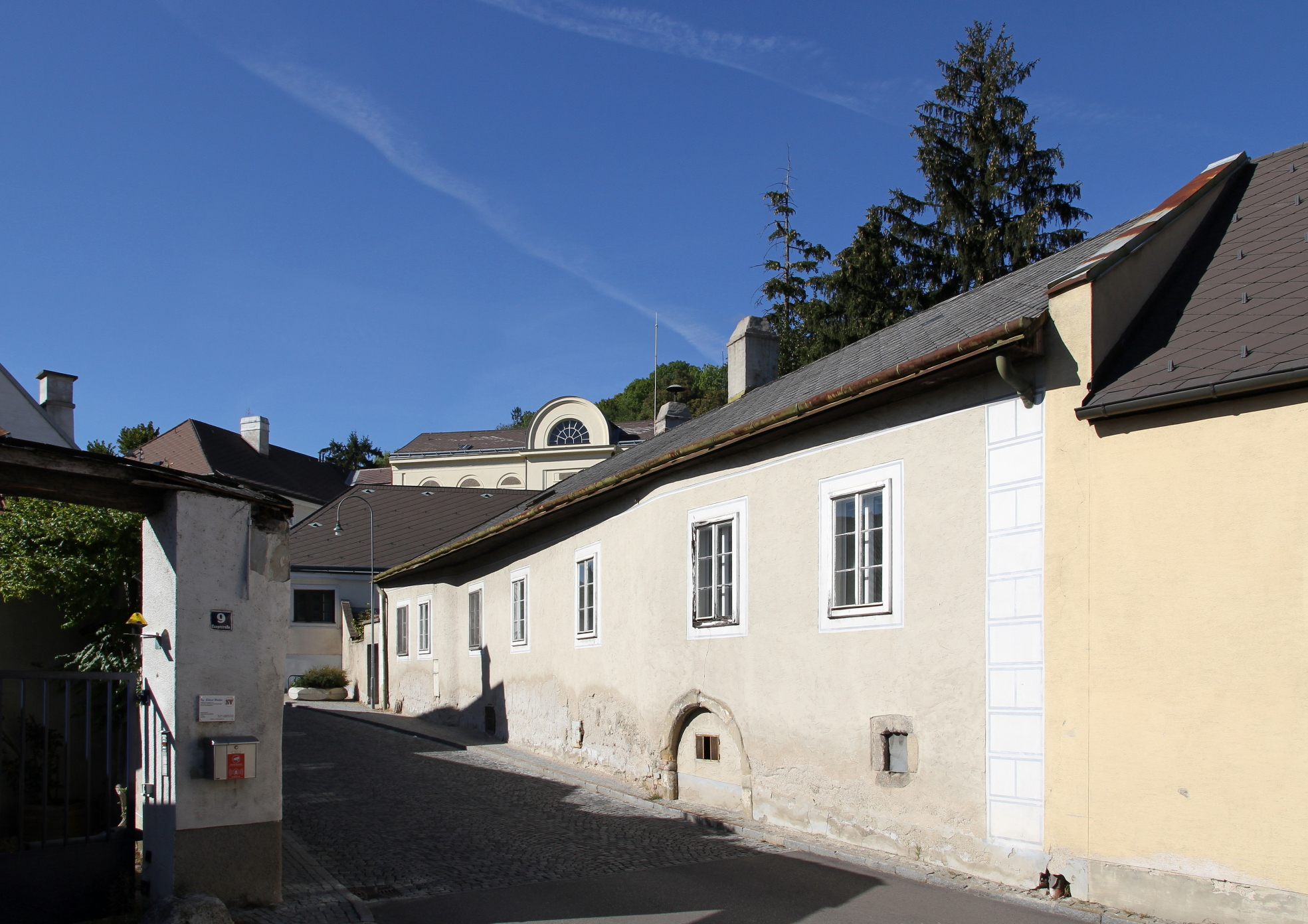 Bauernhof in Weidling (Hauptstraße 6), ein Ortsteil der niederösterreichischen Bezirkshauptstadt Klosterneuburg. Ein straßenparalleler Streckhof mit einer Kernsubstanz aus dem 15./16. Jahrhundert. Das straßenseitig freigelegte Rundbogenportal stammt aus der ersten Hälfte des 16. Jahrhundert.